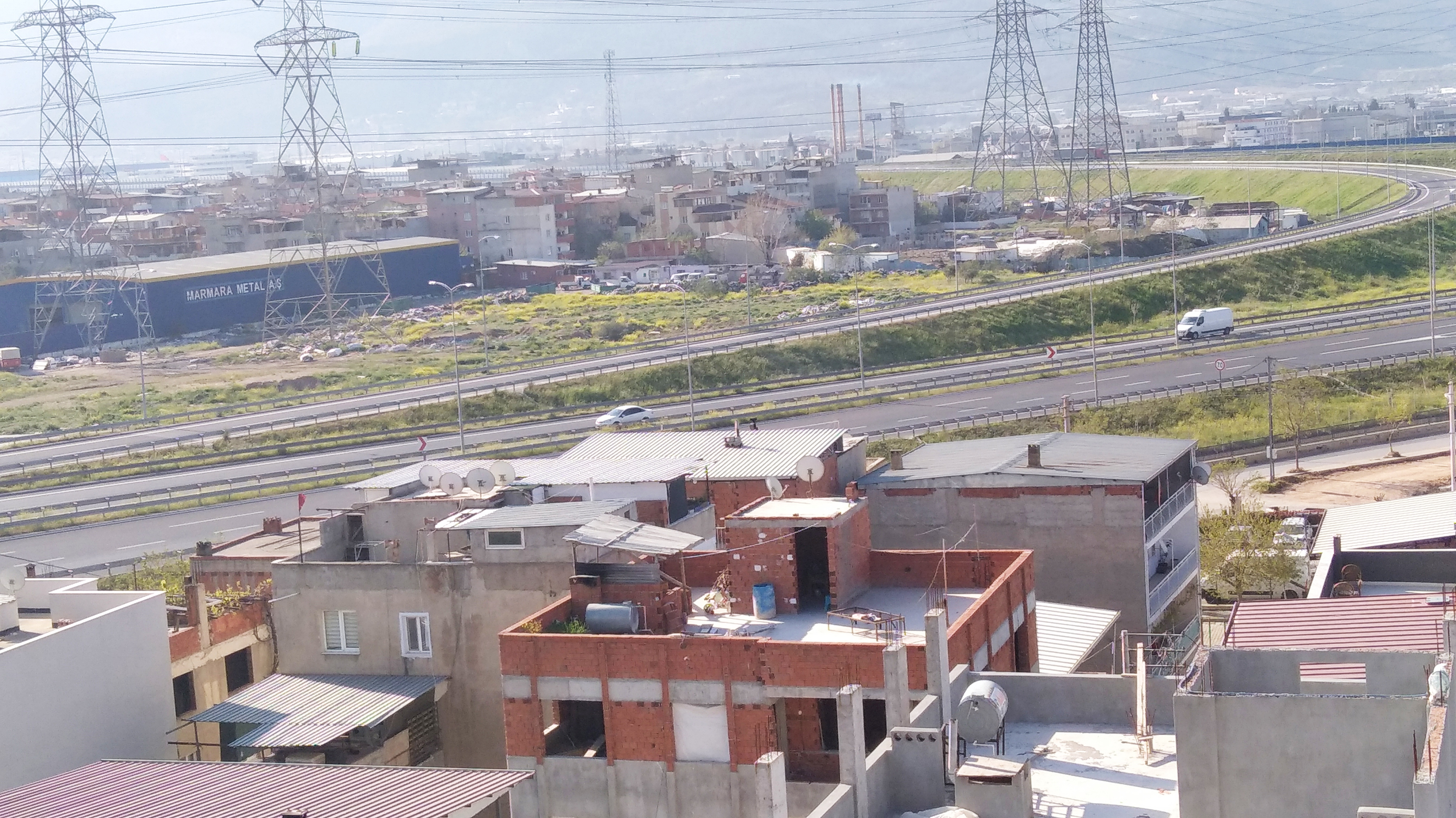 E881 Bornova